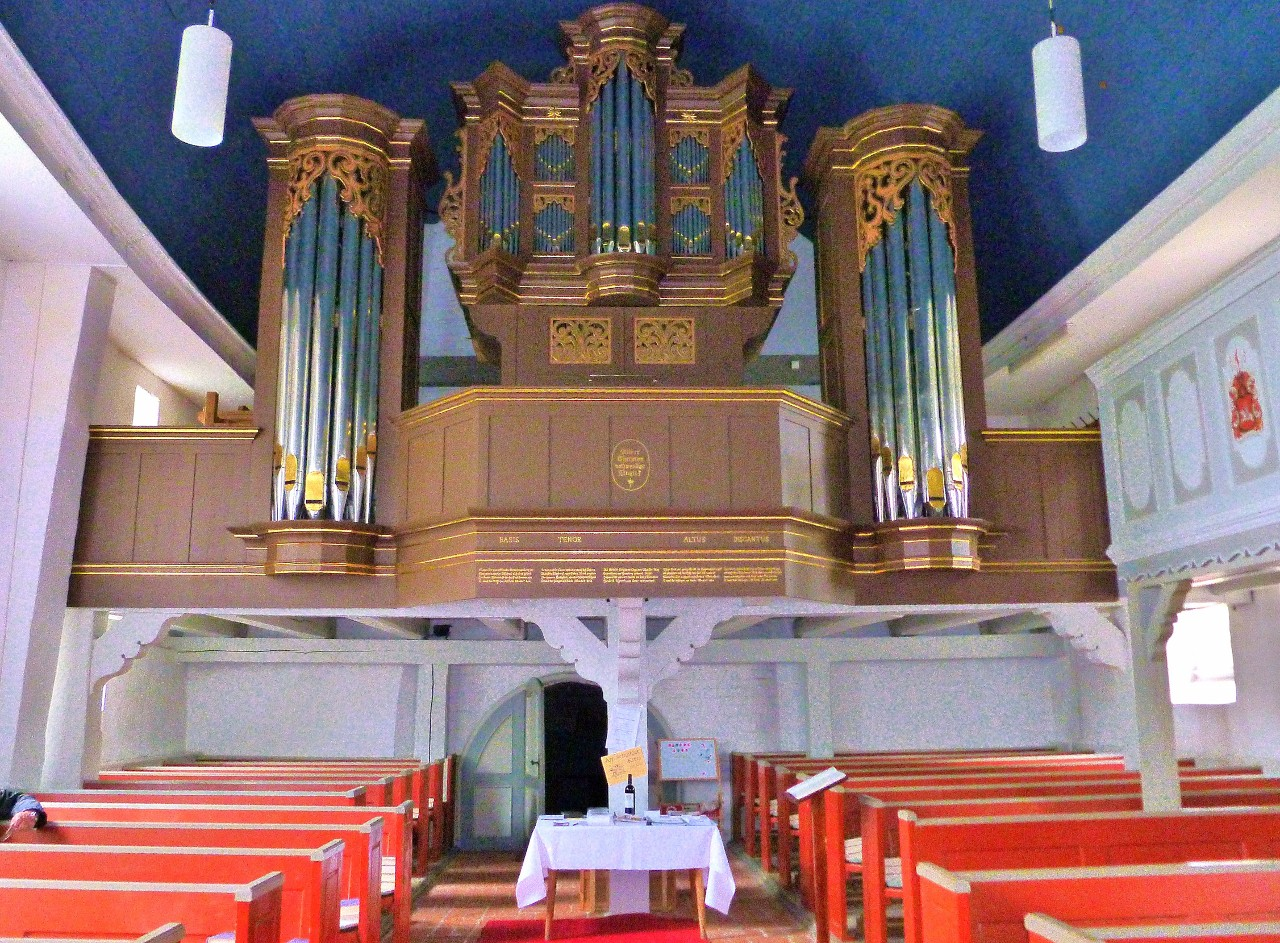 Schnitger-Orgel in Hollern nach der Restaurierung